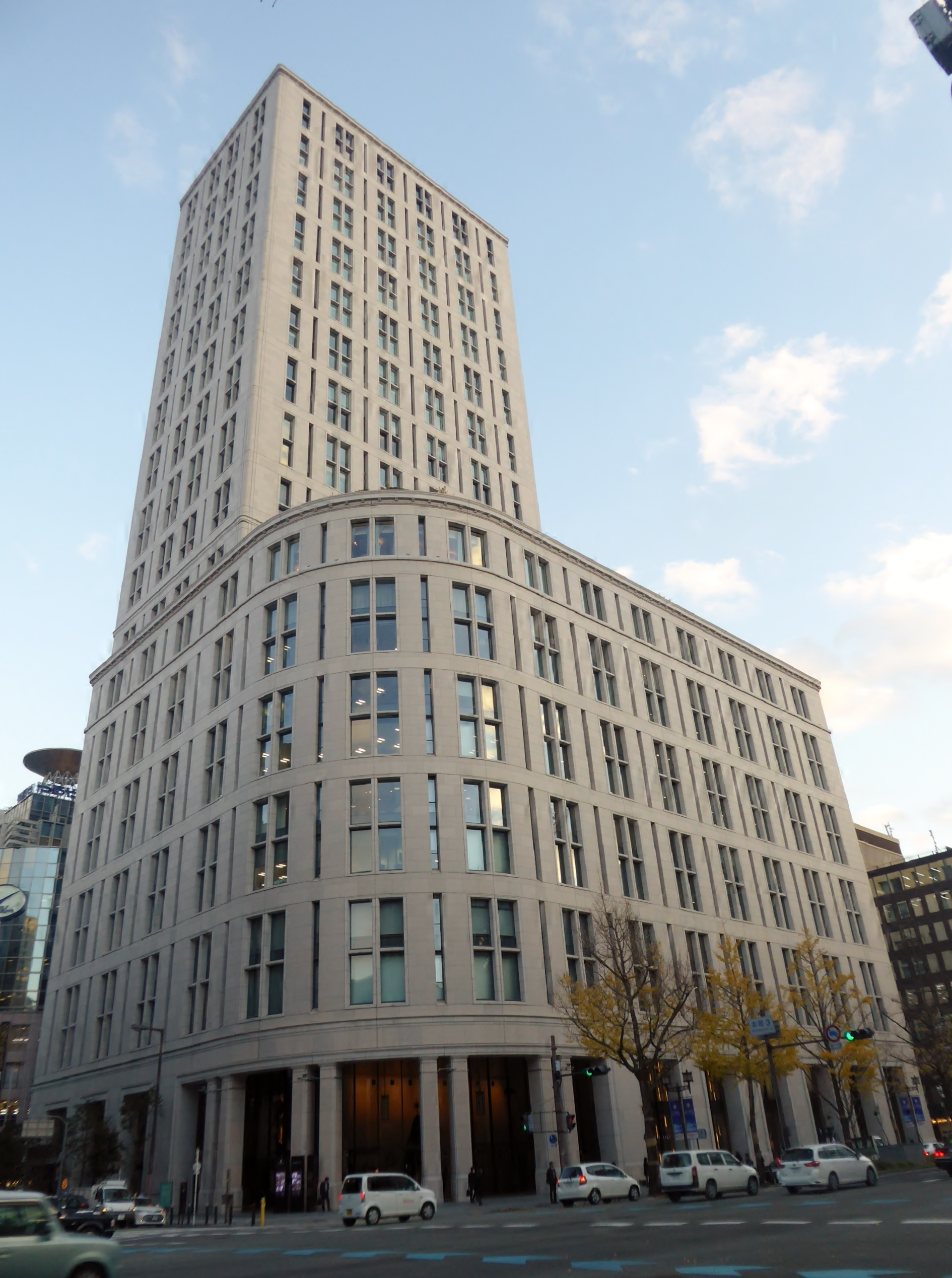 本町ガーデンシティを撮影。